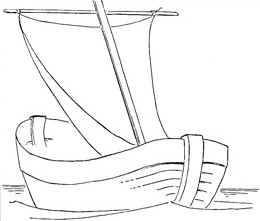 Pequeno bote a vela.